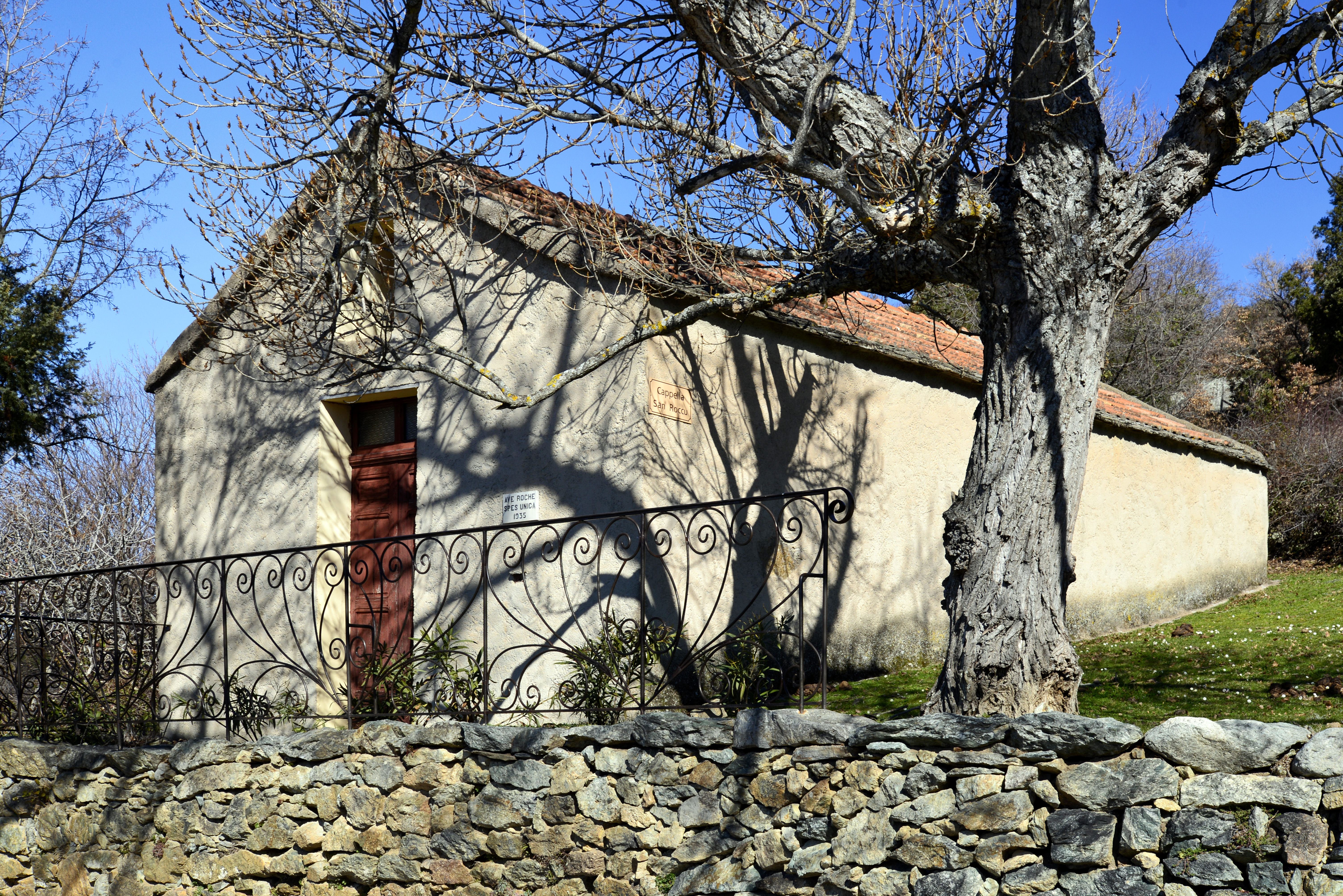 Santa-Lucia-di-Mercurio, Bozio (Haute-Corse) - Chapelle Saint-Roch dit San Roccu, probablement du XVIe siècle, plusieurs fois remaniée, réhabilitée en 1935. Il ne reste plus rien du cimetière qui lui était accolé. Une arca (fosse commune) se trouve sous la chapelle.